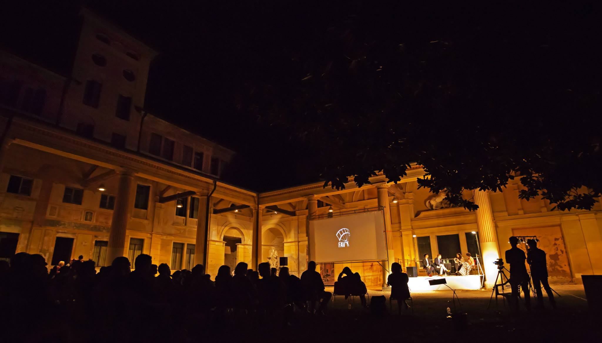 Il momento dell'intervista al regista candidato al Premio Oscar Mark Gill durante la serata di premiazione dell'ottava edizione del Festival Alto Vicentino.